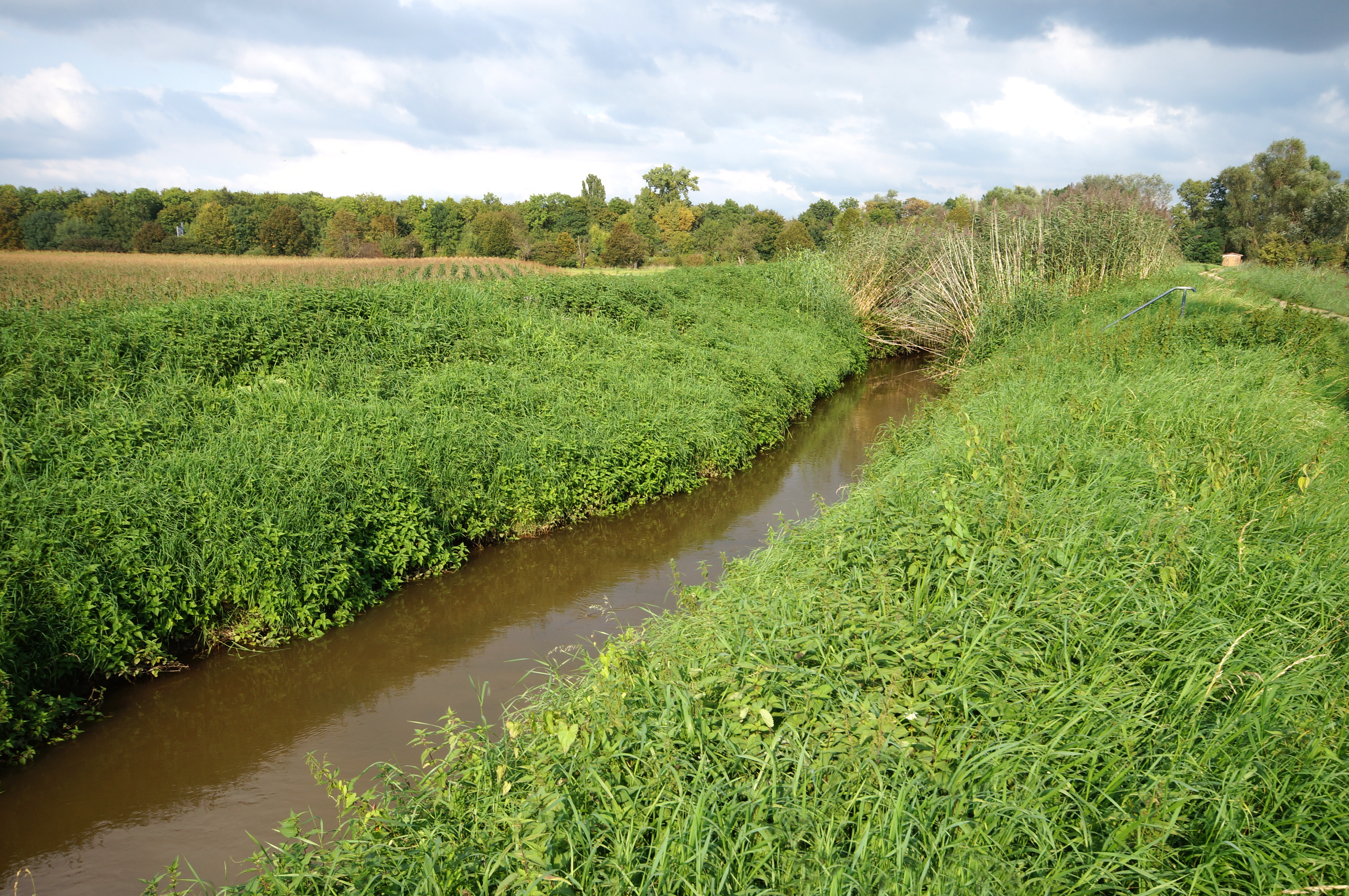 Der Eisbach in Worms nördlich des Flugplatzes Worms. Er ist ein orographisch linker Nebenfluss des Rheins. In der Nähe des Aufnahmeortes quert der Karl-Marx-Graben den Eisbach.